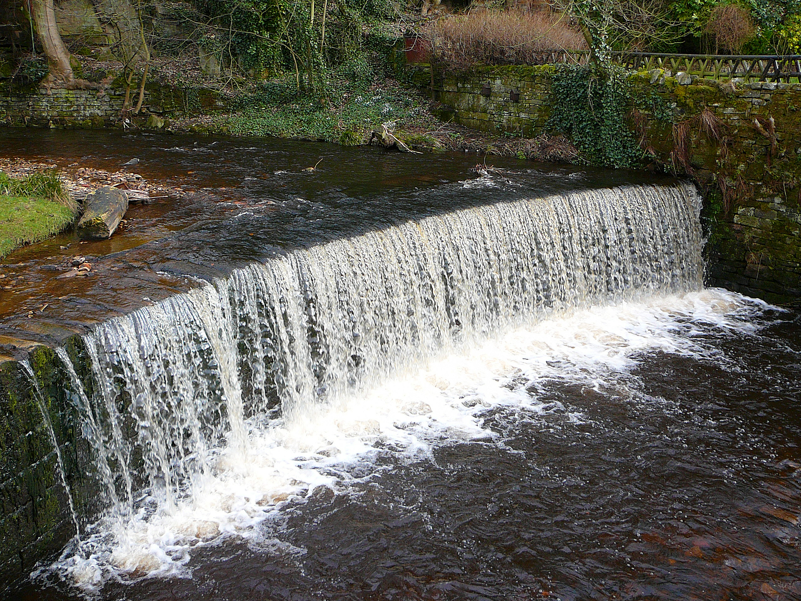 Weir